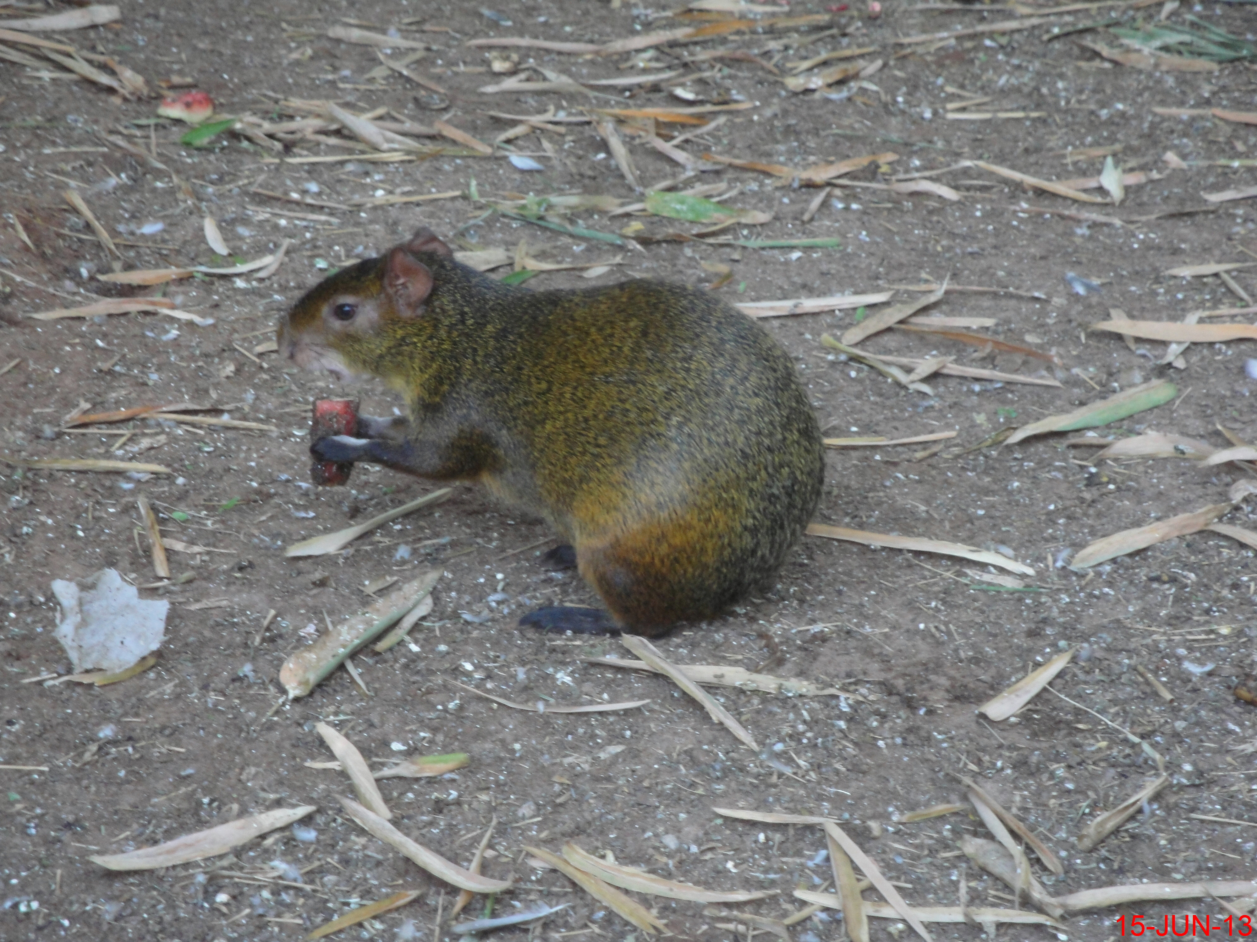 Cutia, animal do gênero Dasyprocta, com várias espécies. São mamíferos roedores de pequeno porte, medindo entre 49 e 64 centímetros. Sete espécies de cutia são encontradas em território brasileiro. Encontrados soltos no Zoológico de Catanduva.